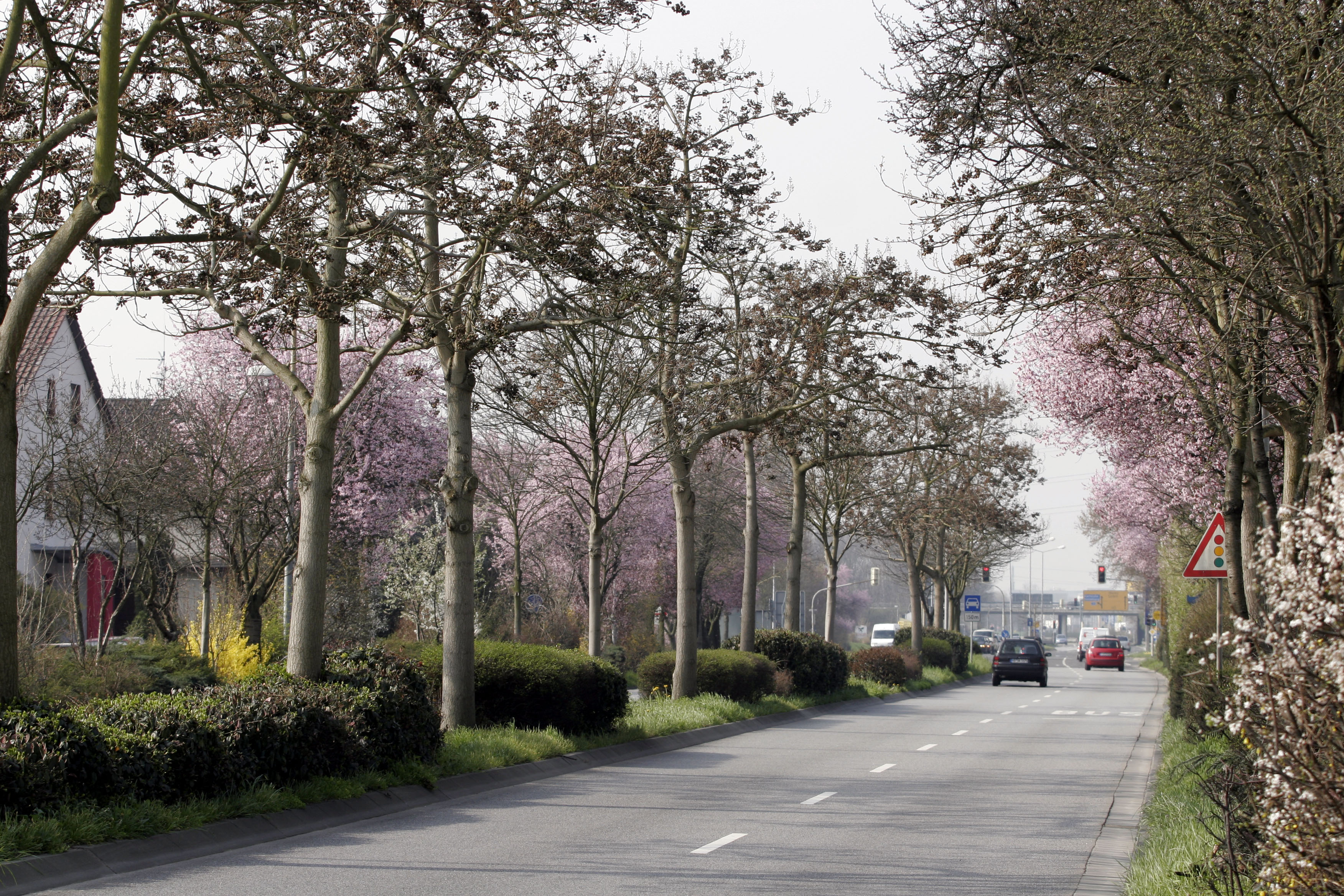 Mandelbaumblüte in Bensheim an der Bergstraße am 16. März 2007 in der Wormser Straße in westlicher Richtung